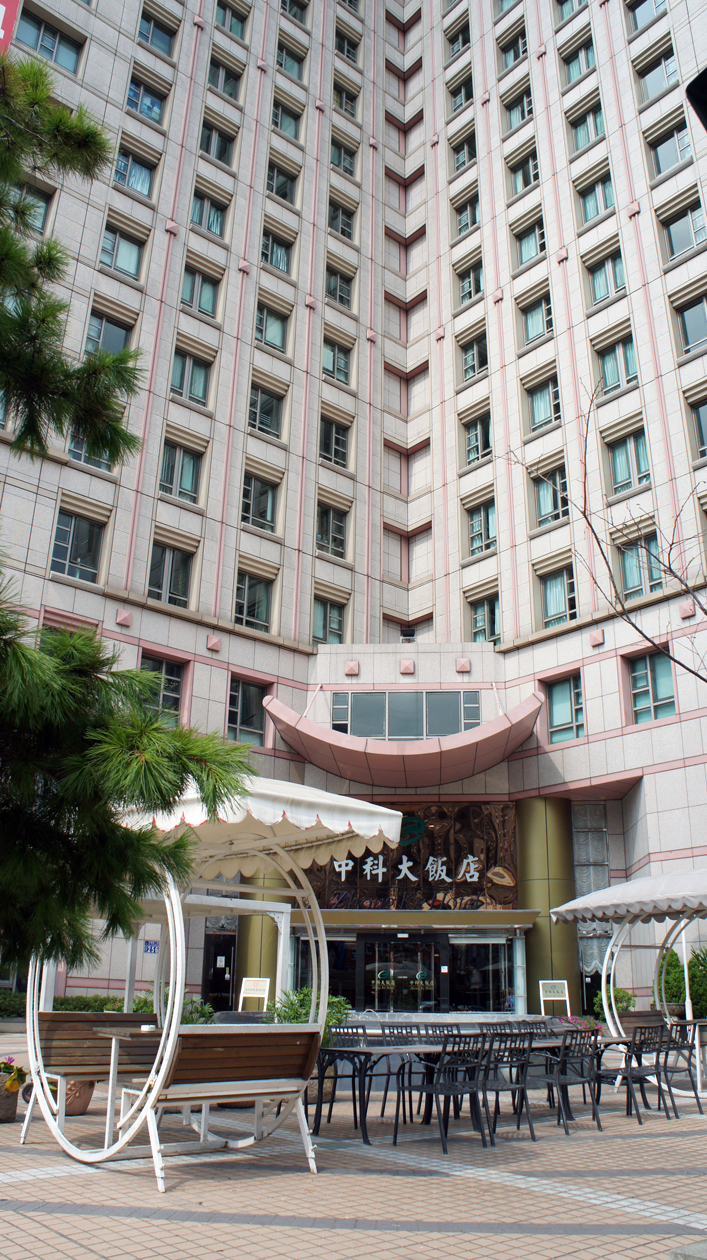 中文（台灣）: 中科大飯店。